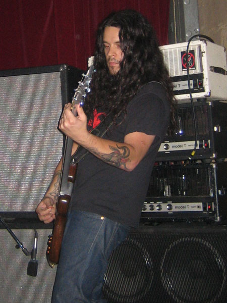 Stephen O´Malley live with Khanate.